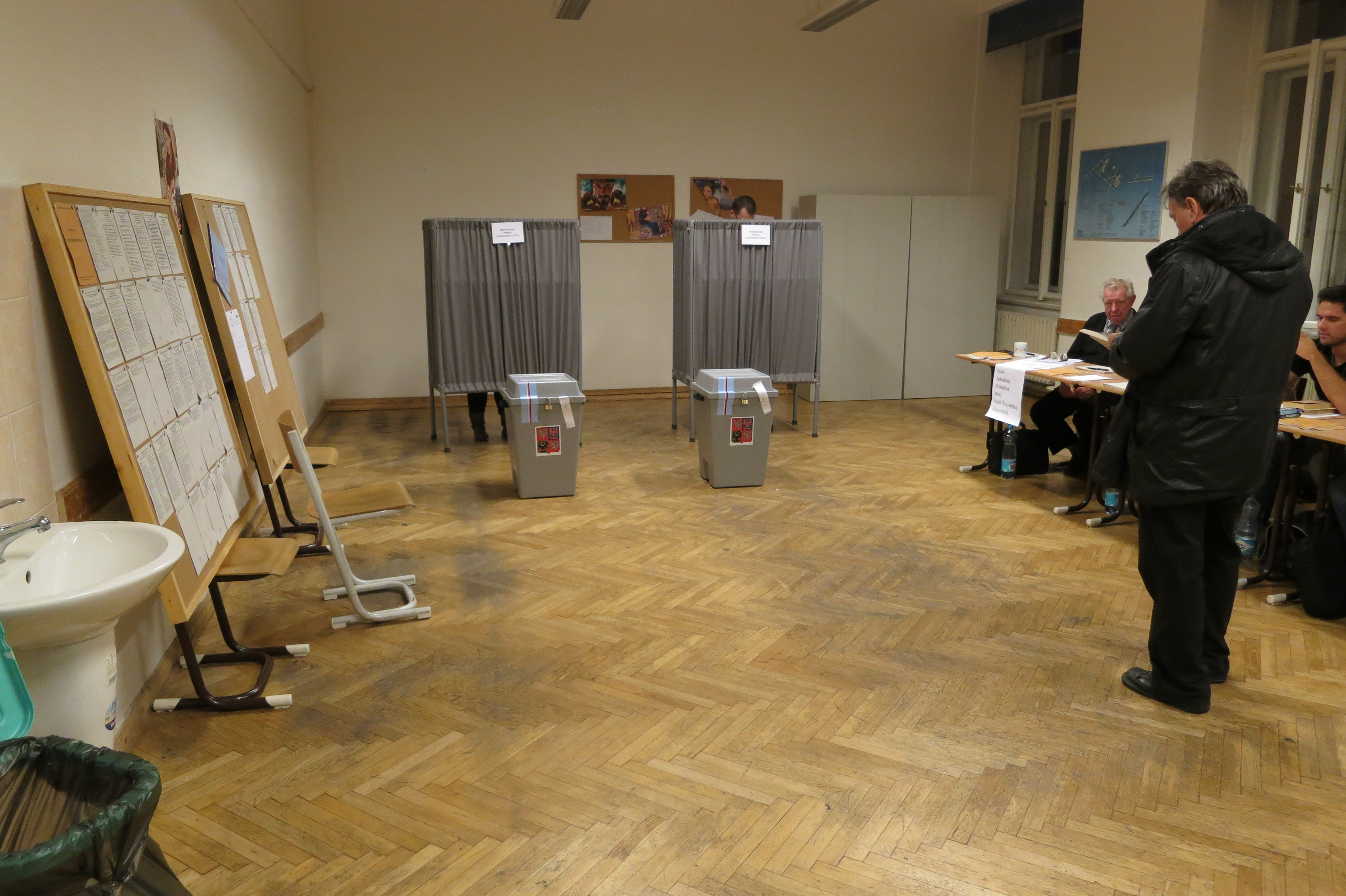 Volební místnost při volbách do českého parlamentu v roce 2013 v Praze, Palmovka.